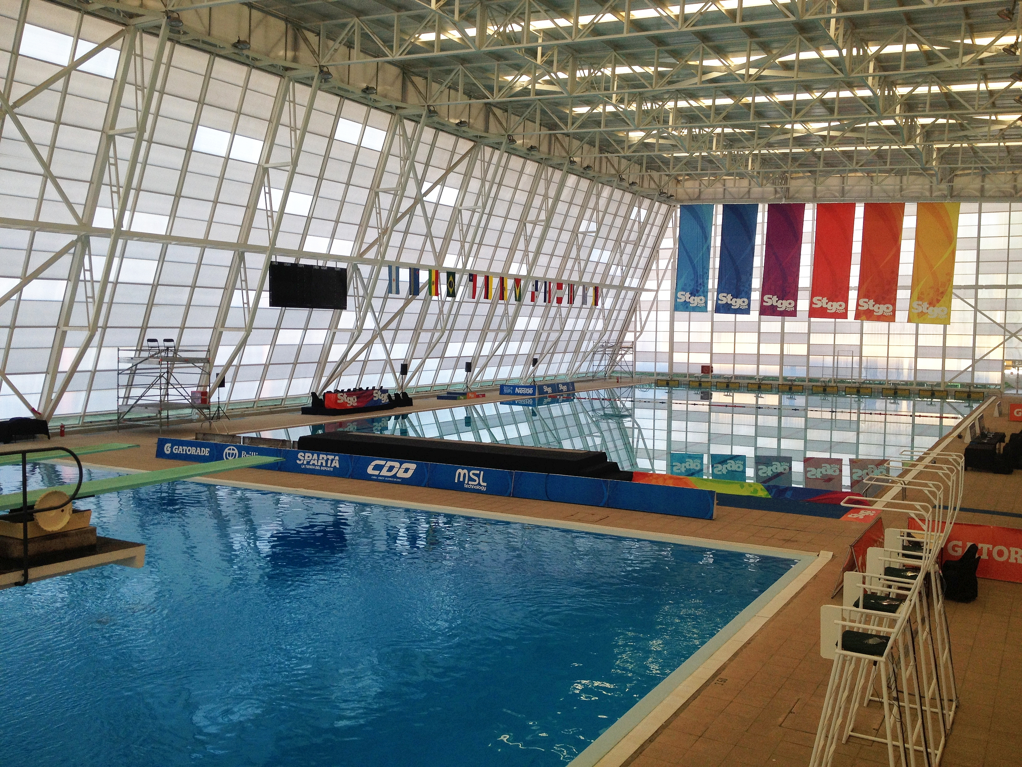 X Juegos Suramericanos Santiago 2014 Centro Acuático Estadio Nacional Natación Jornada 13.03.2014